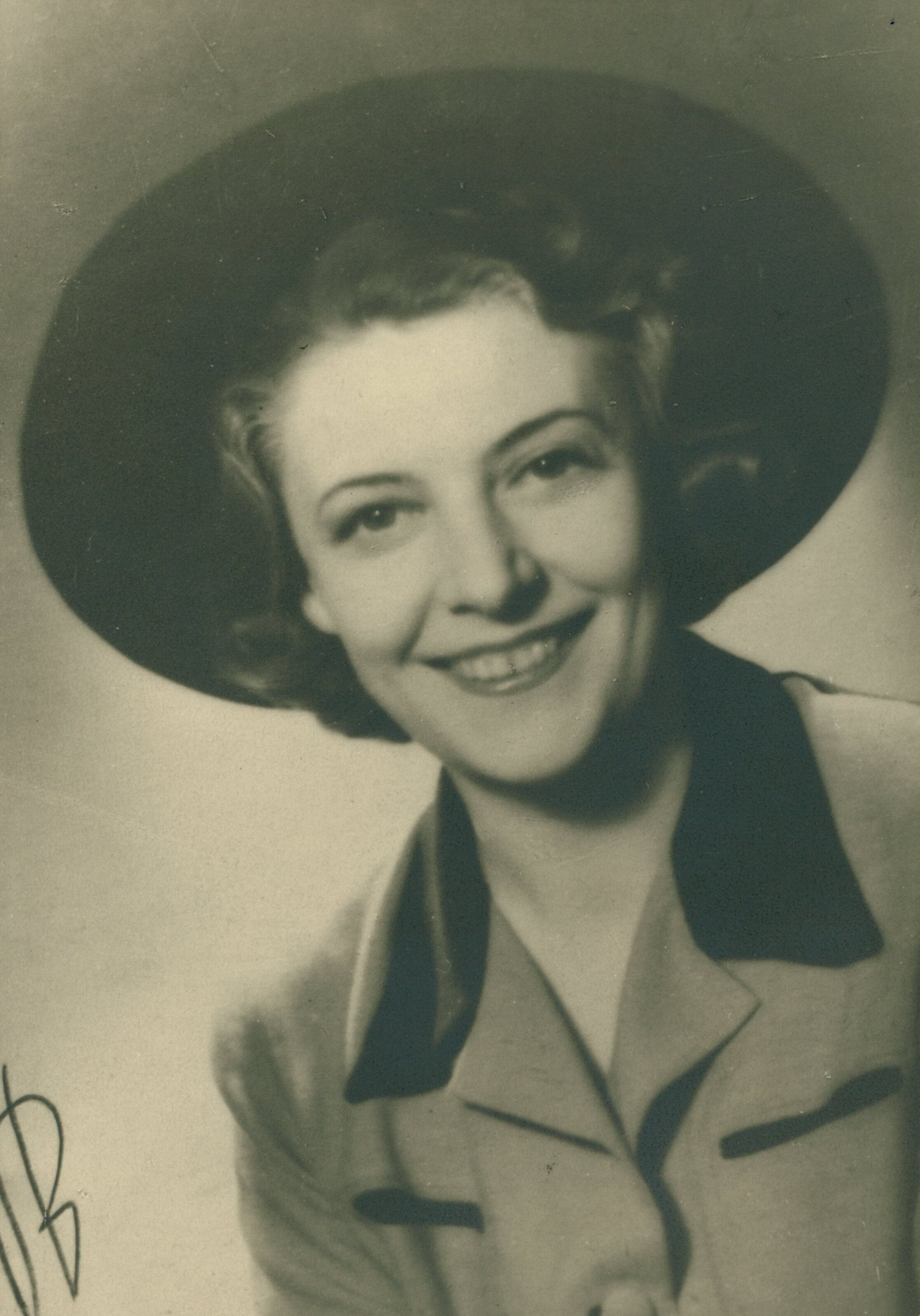 Eugenia Umińska, ok. 1943 r.